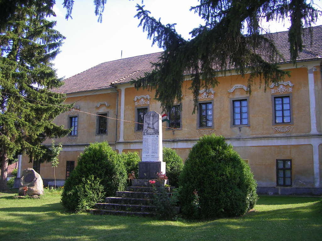 Kemence - egykori vármegyeháza, előtérben a két világháború áldozatainak emlékműve